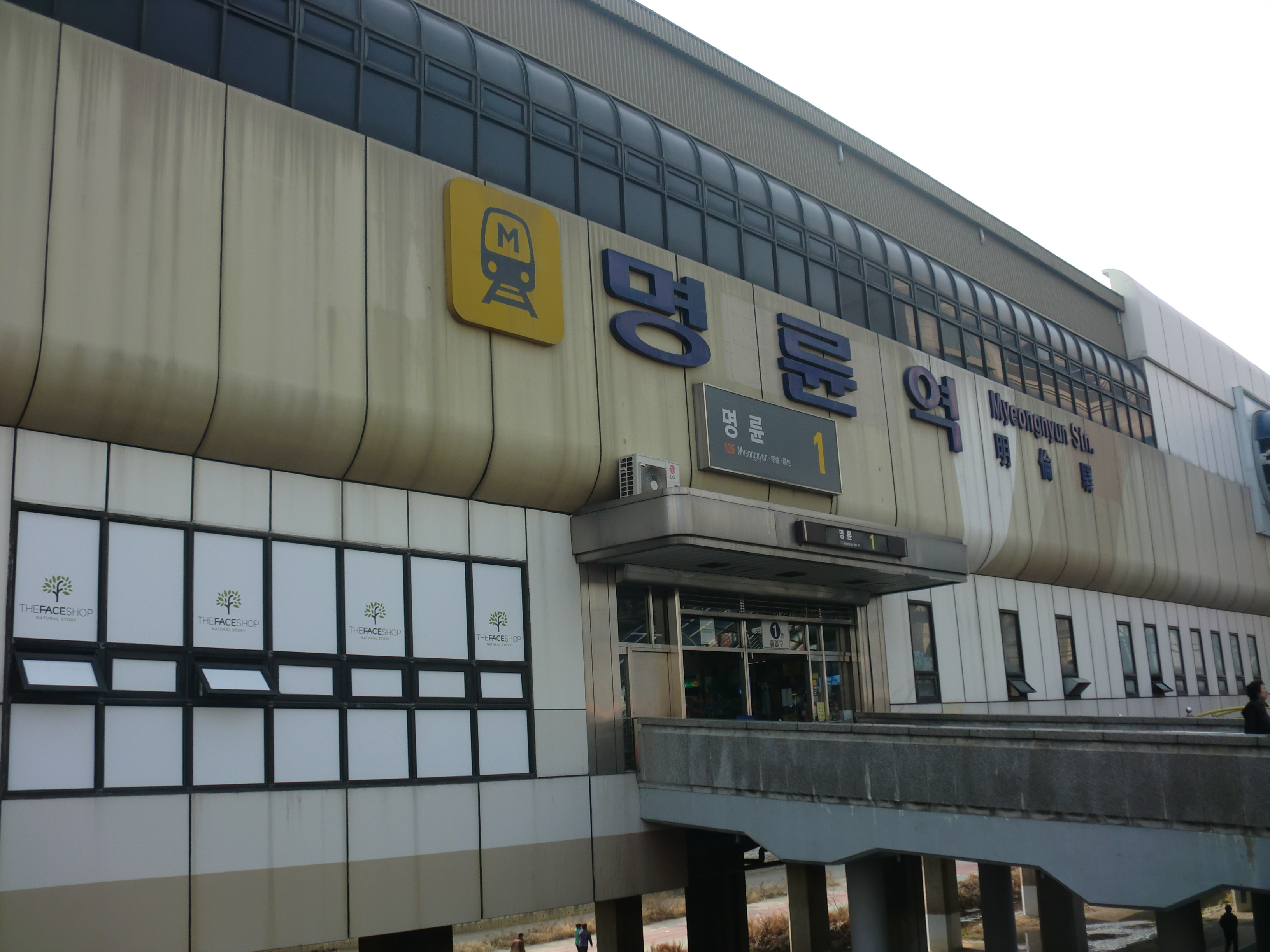 부산도시철도 1호선 명륜역 1번출입구